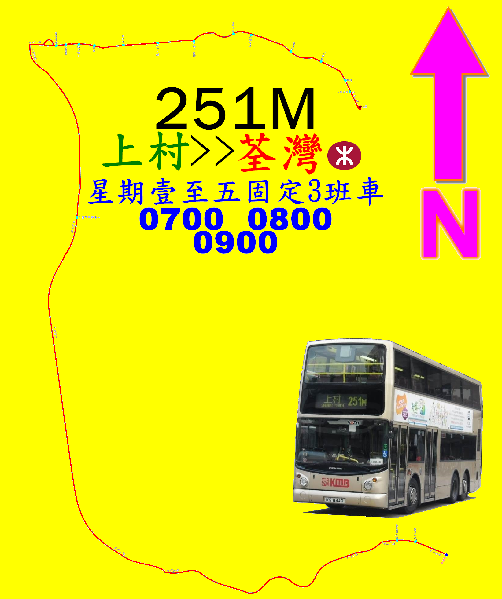 中文（香港）: 九巴251M線的走線圖